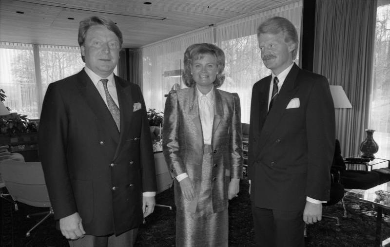 Bonn, den 19.04.1988 Hannelore Kohl, Gattin des Bundeskanzlers und Präsidentin des Kuratoriums ZNS (Zentrales Nerven System) für Unfallverletzte mit Schaden des Zentralen Nervensystem e.V. (Mitte), wurde von den Herren Geerkens und Schmitz aus Anlaß des einjährigen Jubiläums der Osnabrücker "Einkaufs-Passage" ein Scheck zugunsten des Kuratoriums ZNS übergeben.